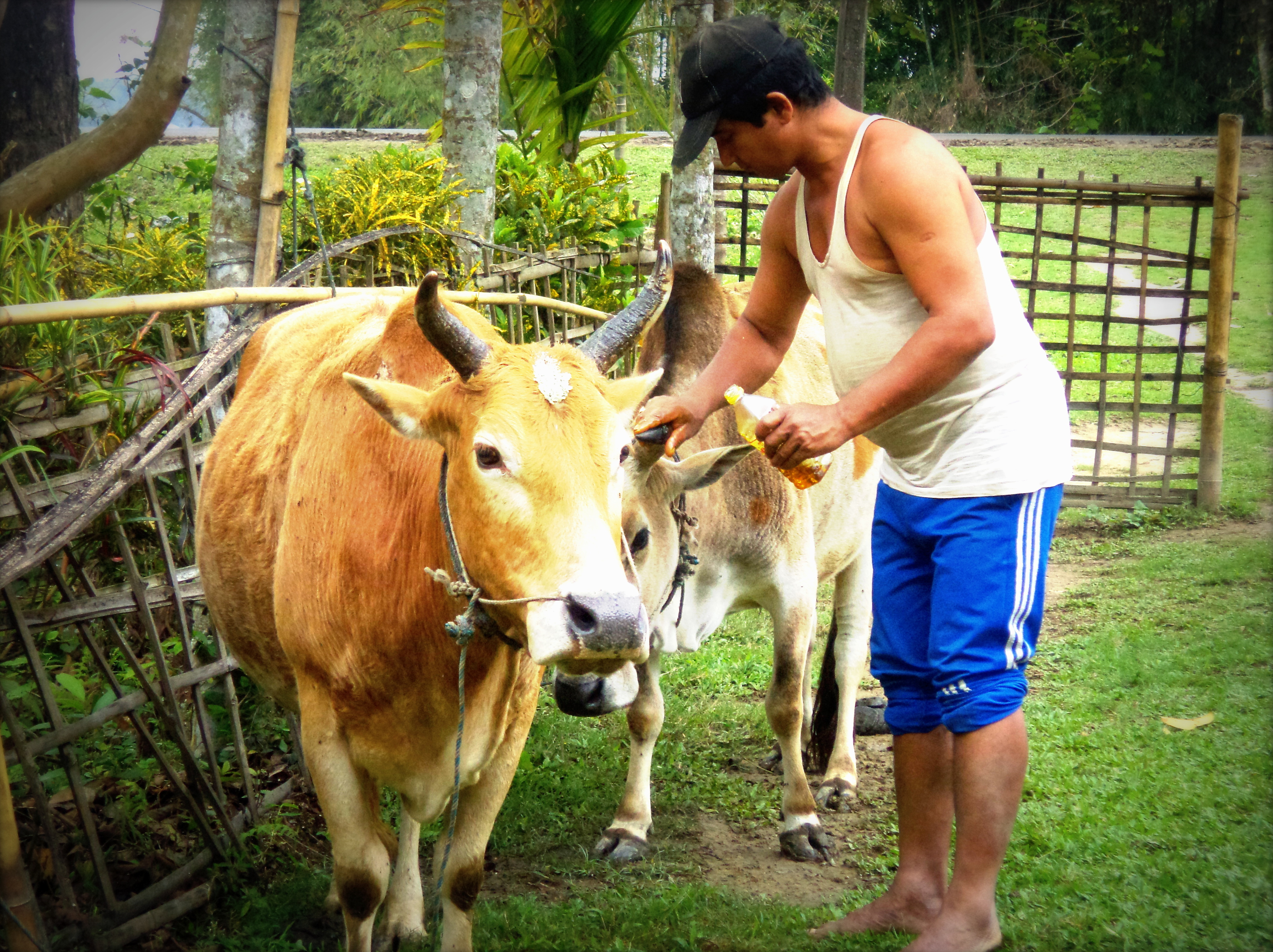 অসমীয়া: গৰুৰ গা ধুৱাৰ প্ৰস্তুতি